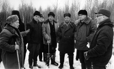 Nikita S Hrushstshev puhuu, Urho Kekkonen, Leonid Brezhnev, Nikolai Podgornyi, Jorma Vanamo ja Kustaa Loikkanen kuuntelevat.